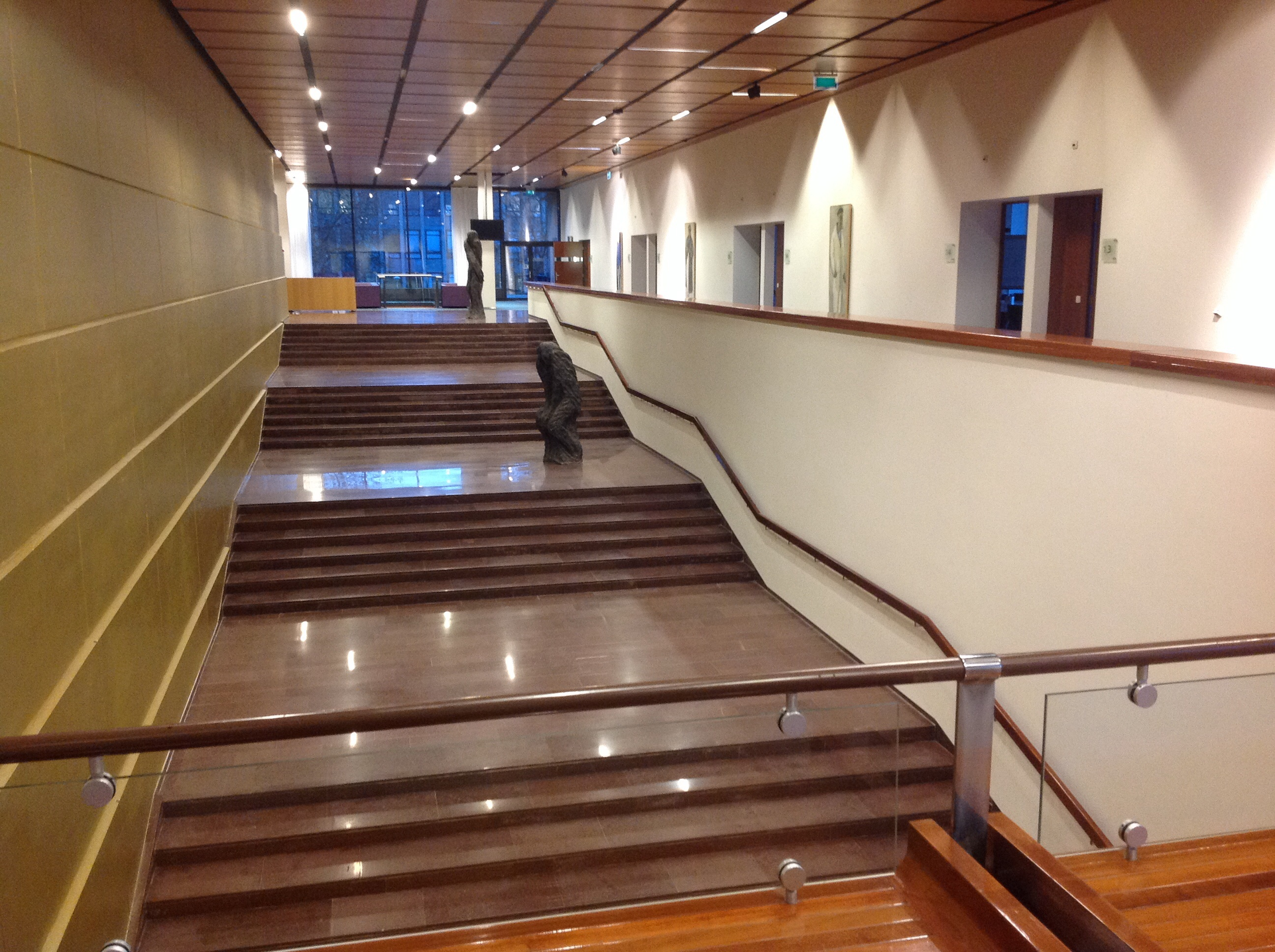 Provinciehuis Overijssel, Zwolle.